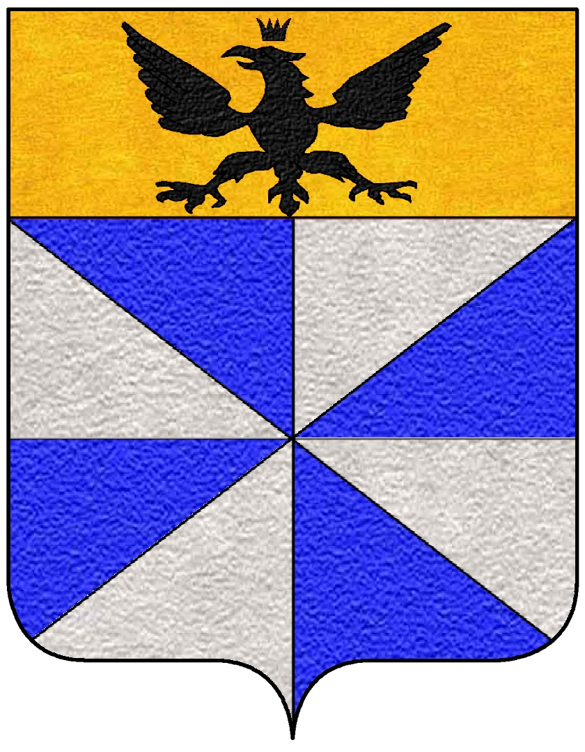 Stemma della famiglia Airoldi di Robbiate